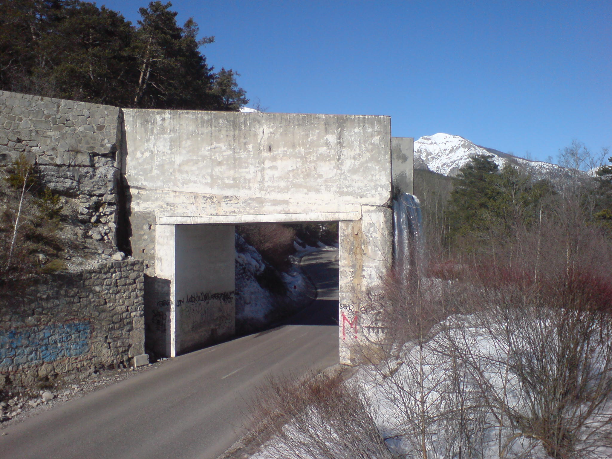 Pont-bâche de la cascade du Verdon, à Beauvezer